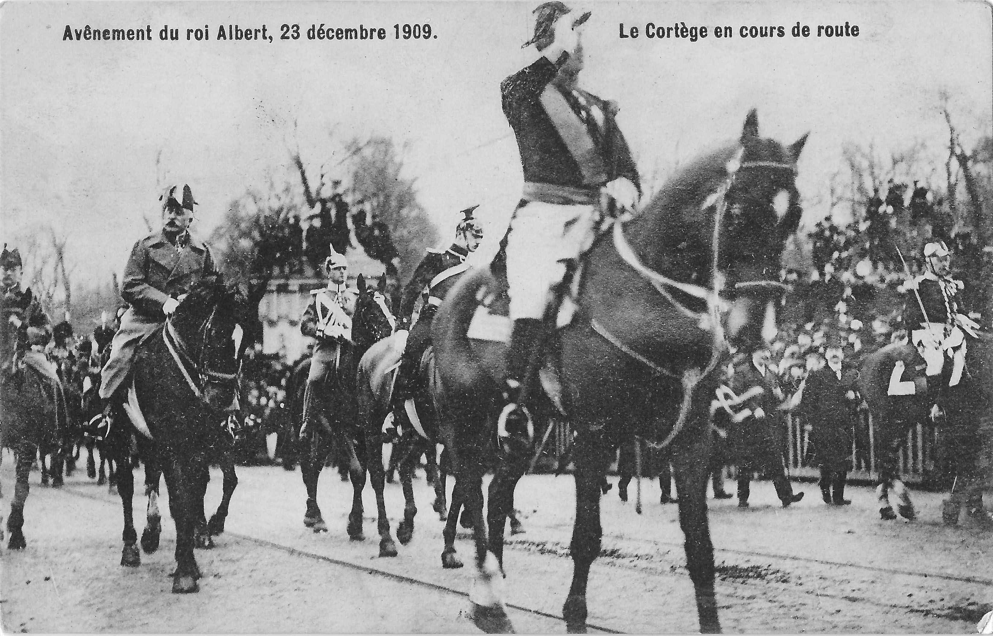 De parade voor de kroning van Albert I in Brussel